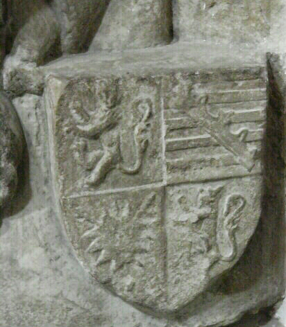 Darstellung des Wappens Fürstbischofs Gerhard von Schwarzburg auf seinem Epitaph im Würzburger Dom